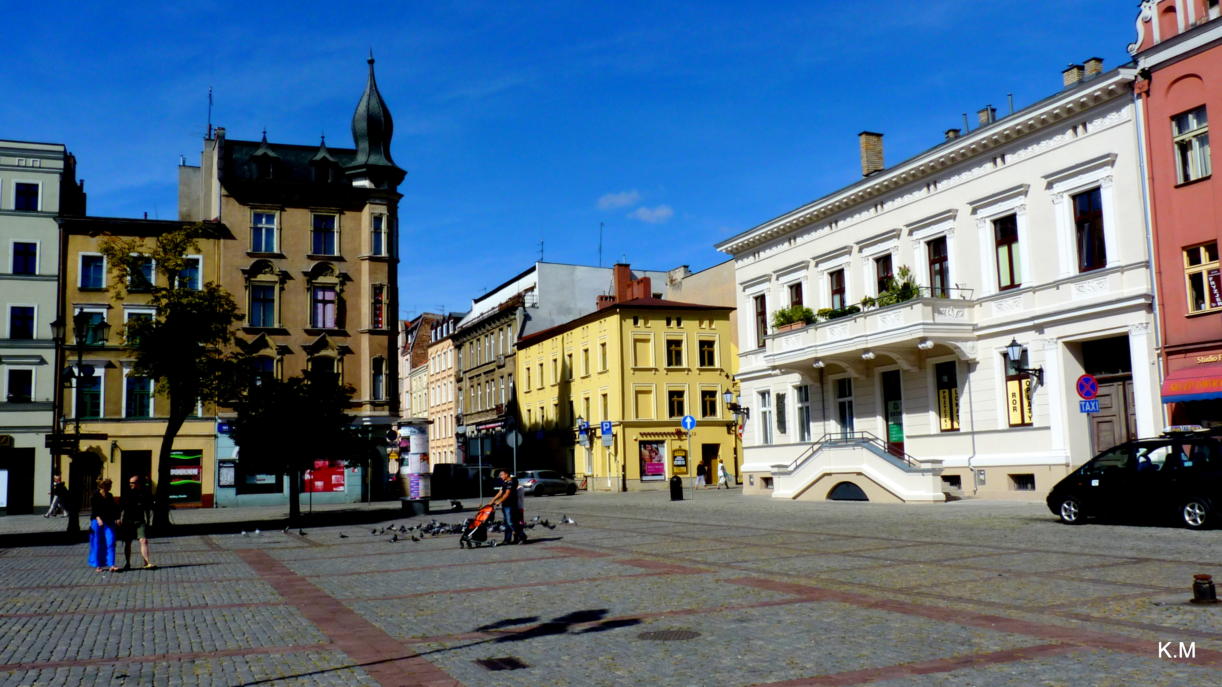 Toruń - Rynek Nowomiejski